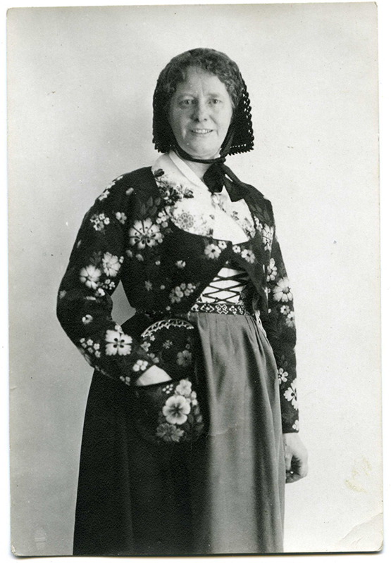 Depicted person: Louise Hagberg, FIL DR